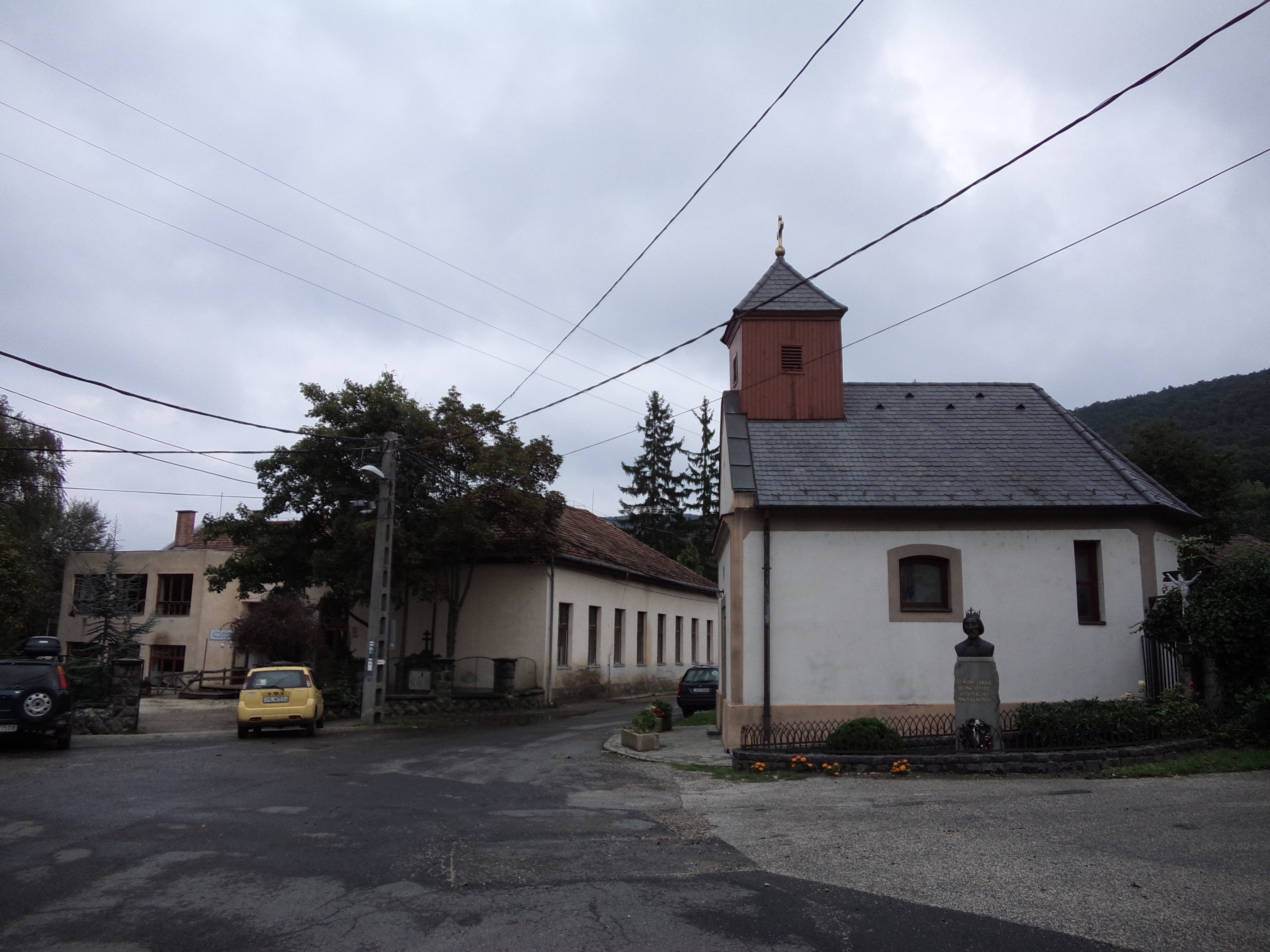 Pilisszentlászló. Szűz Mária bemutatása-kápolna. Klasszicista, 1825. miserend